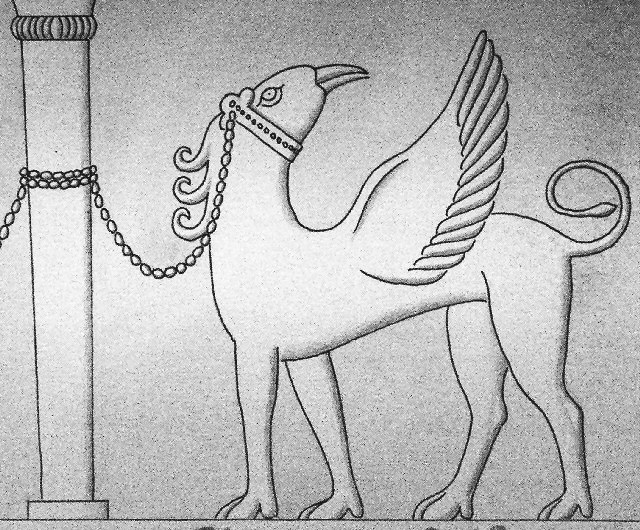 Minoischer Flügelgreif aus Kreta, schematische Darstellung Ort: Archäologisches Museum, Iraklio, Kreta